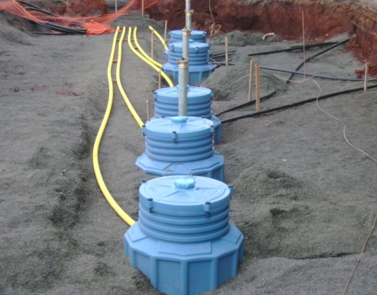 Sump (jacketed tank)